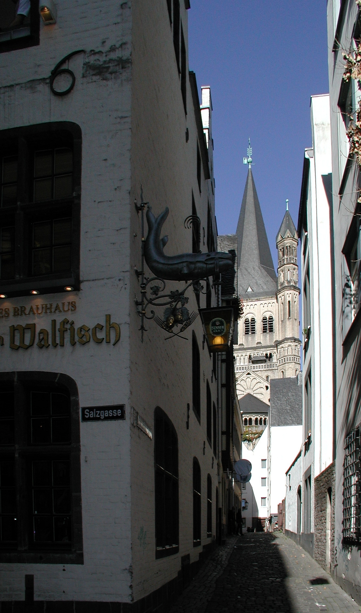 Koeln-Altstadt